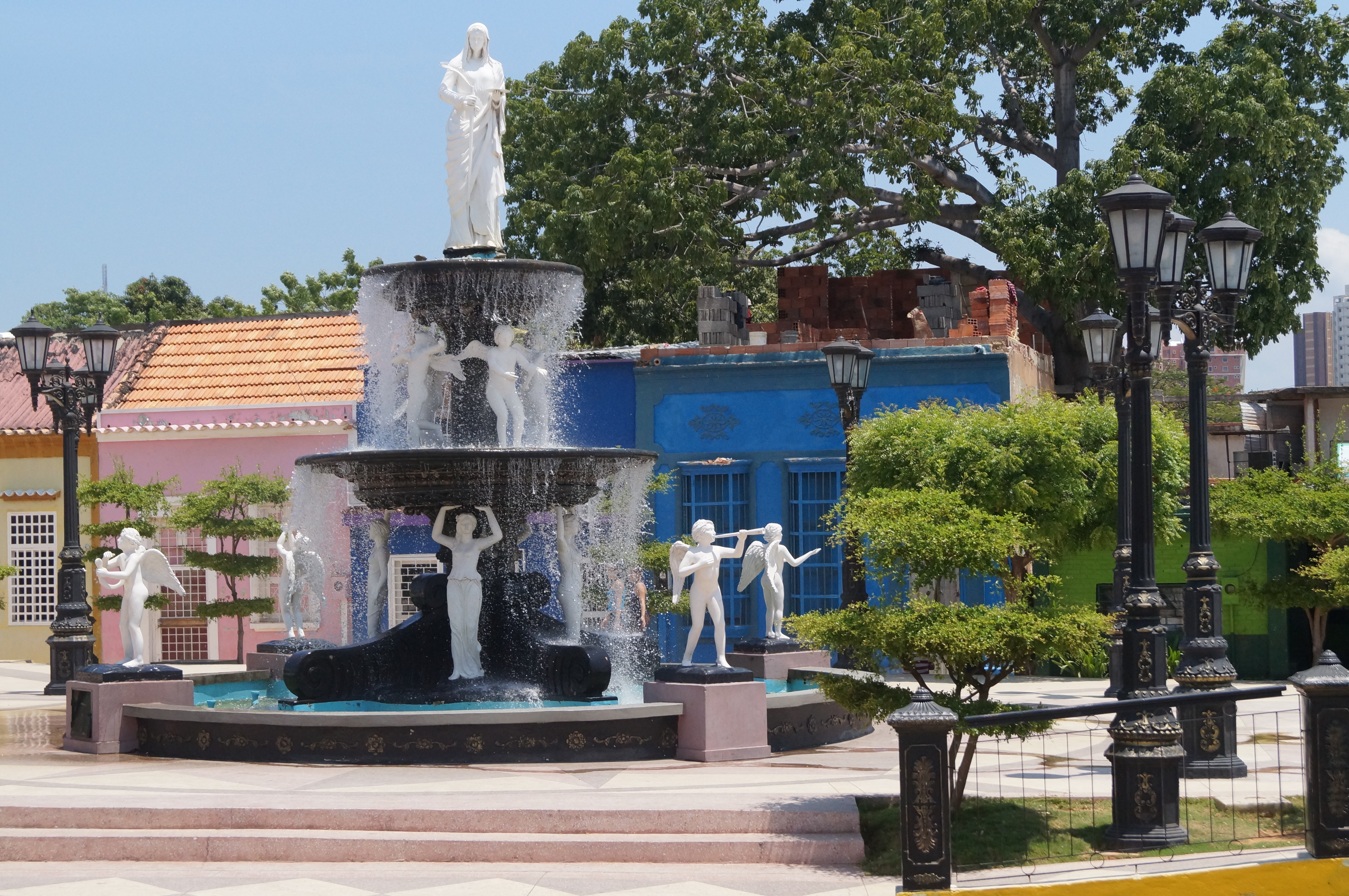 Sector Sta. Lucia. Barrio el Empredrao